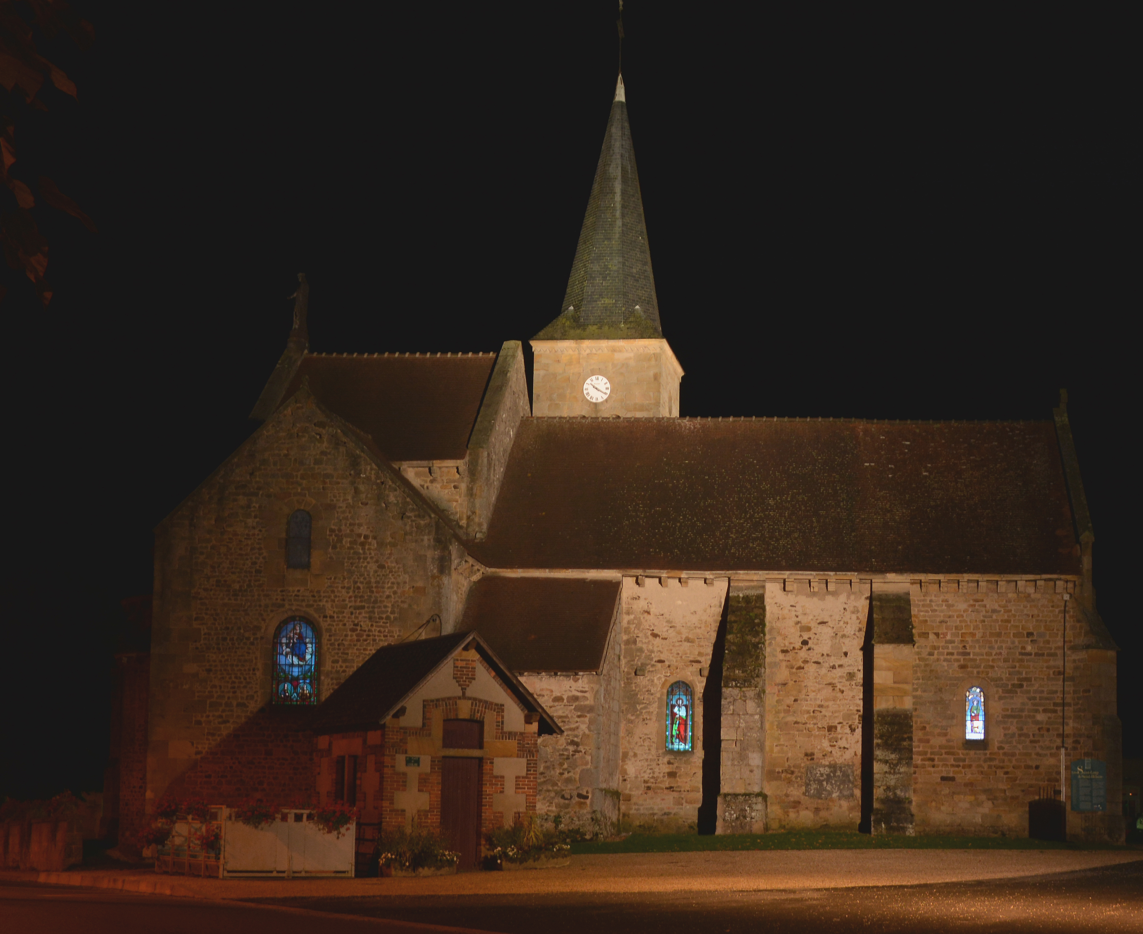 Photo prise le 4 octobre 2013 à la nuit .